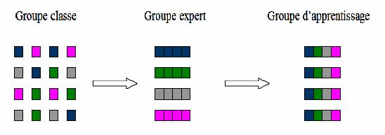 Schématisation du fonctionnement du "jigsaw classroom"